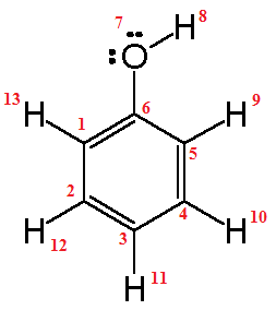 Wzór chemiczny fenol